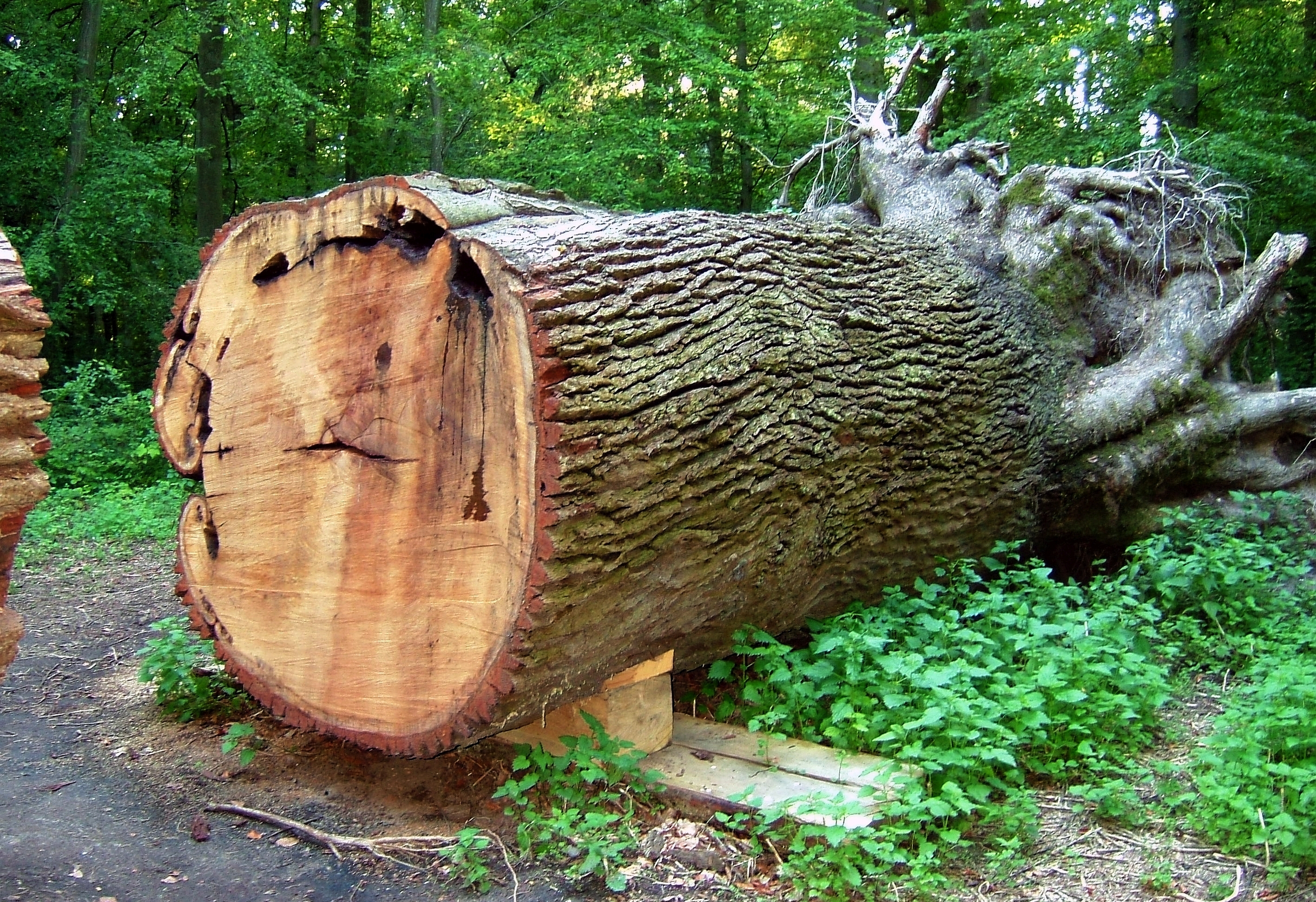 Naturdenkmal Dicke Eiche im Kottenforst bei Bonn (Detailaufnahme)